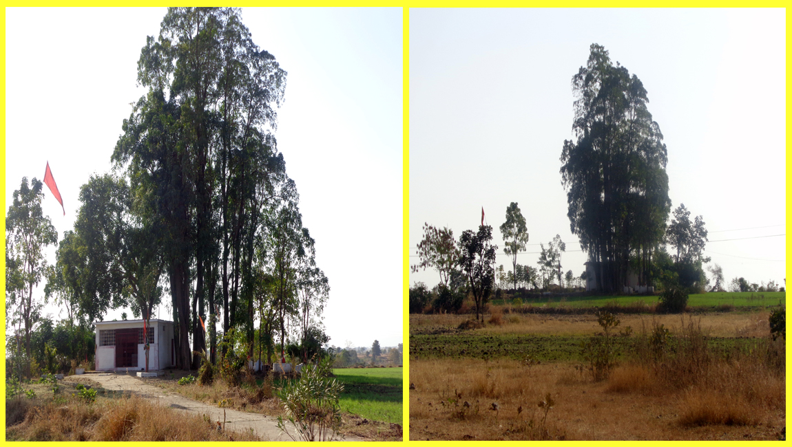 hi:बंडोल: खैरमाई बंडोल